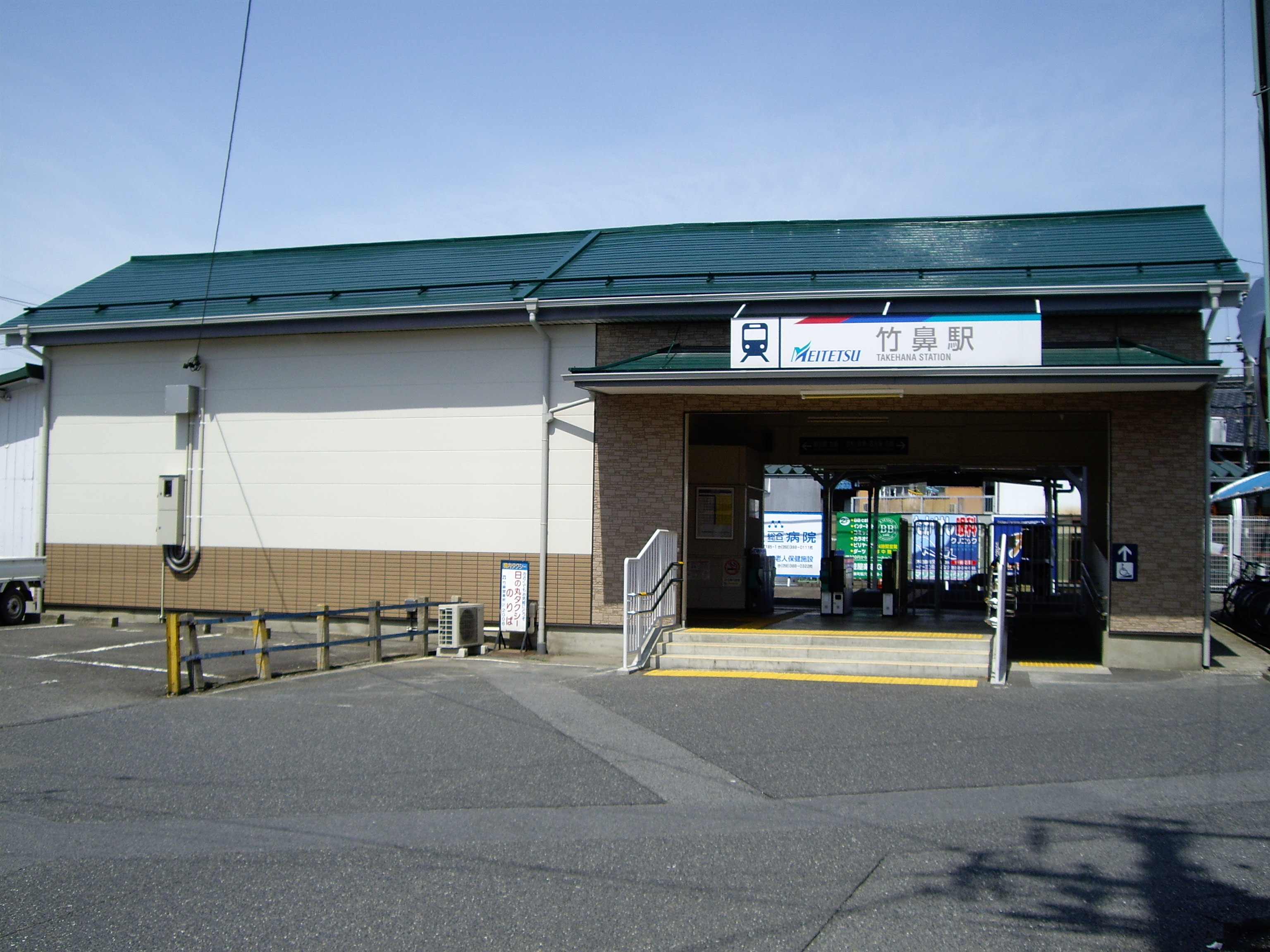 Takehana Station(竹鼻駅)